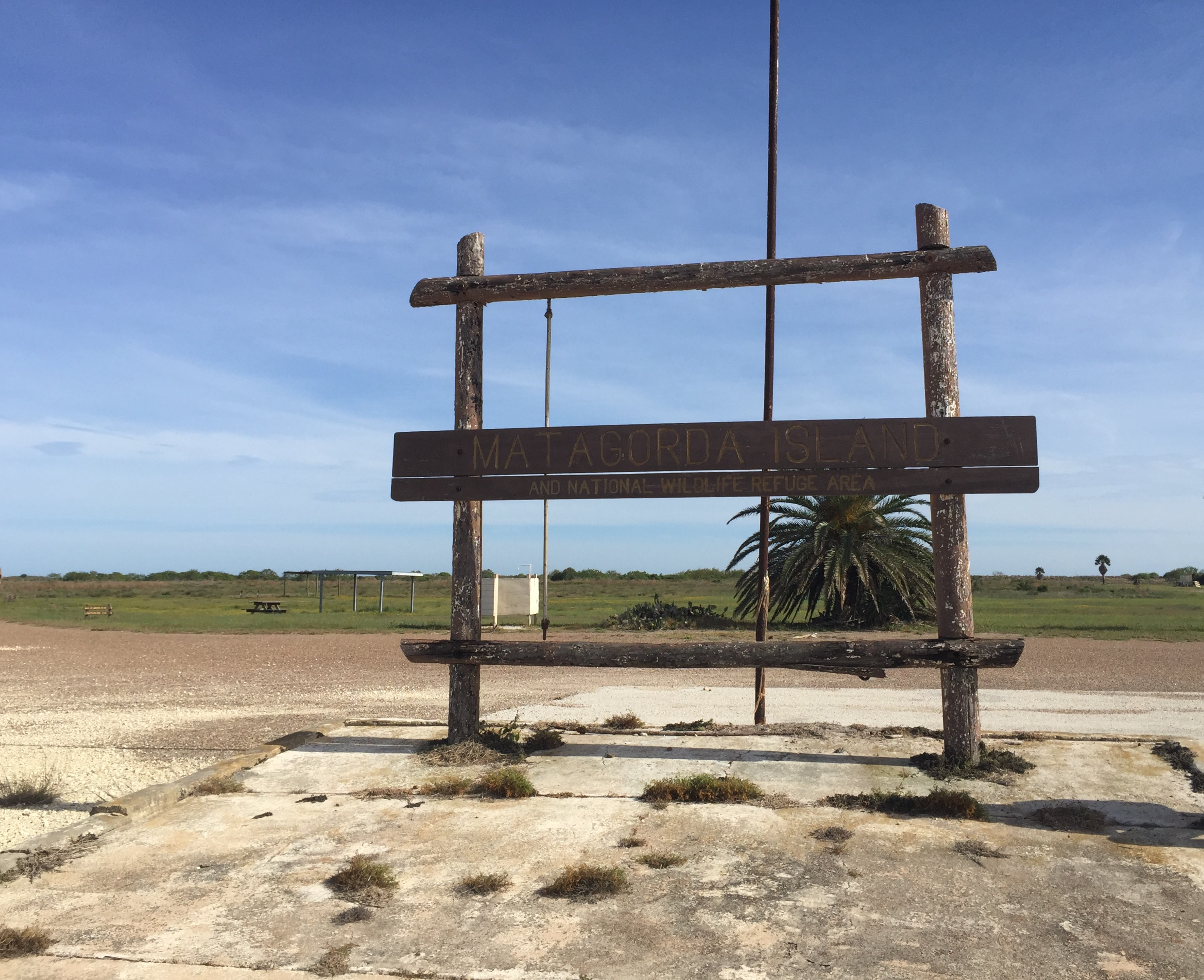 Matagorda Island sign